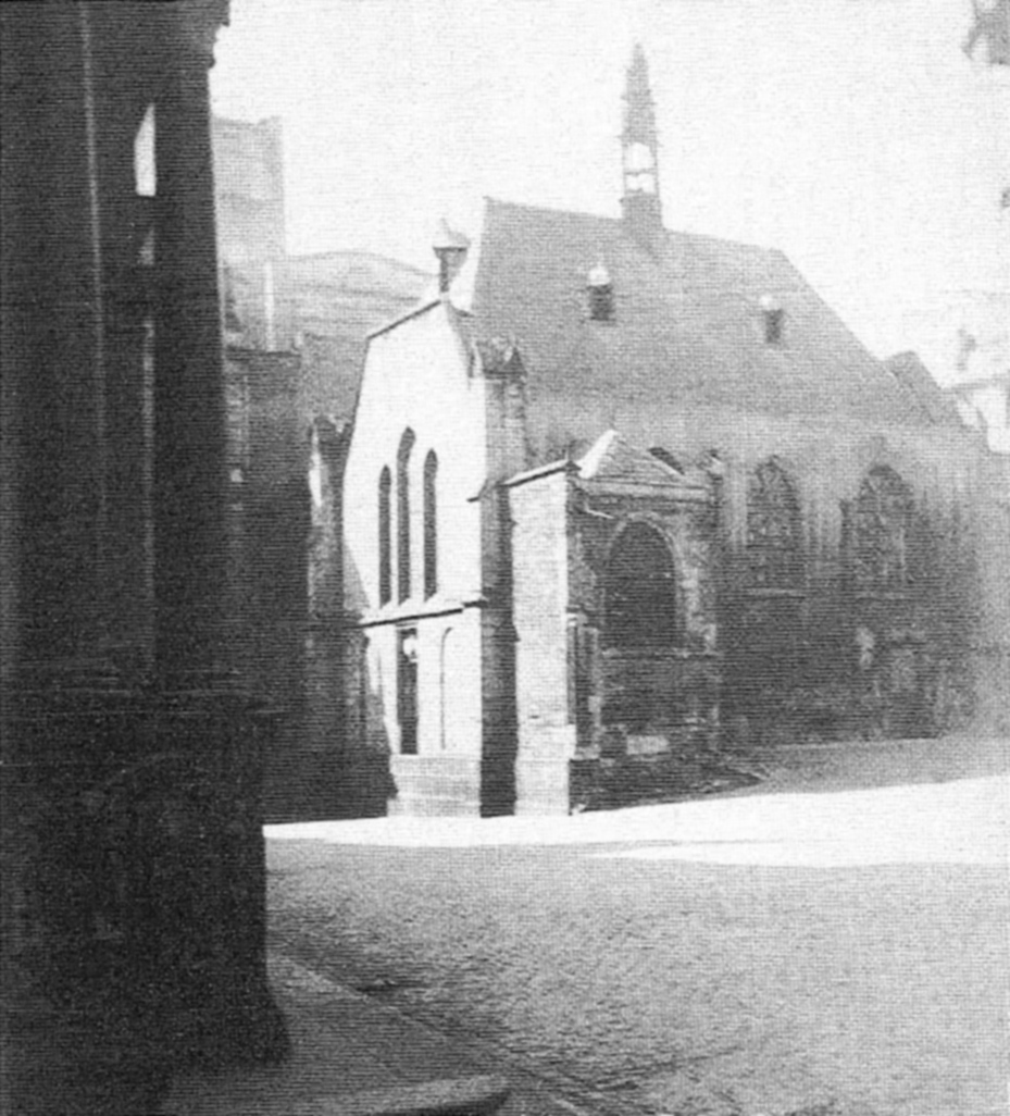 Köln, Ratskapelle von Nordosten.